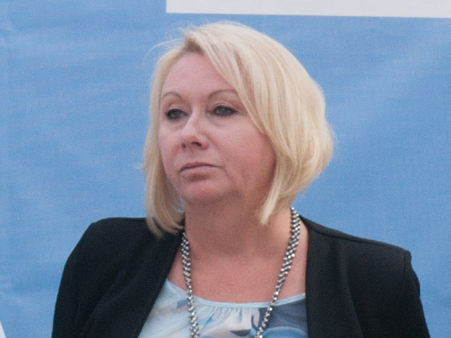 Karin Strenz beim Wahlkampfabschluss der CDU Mecklenburg-Vorpommern in Bad Doberan am 3. September 2016